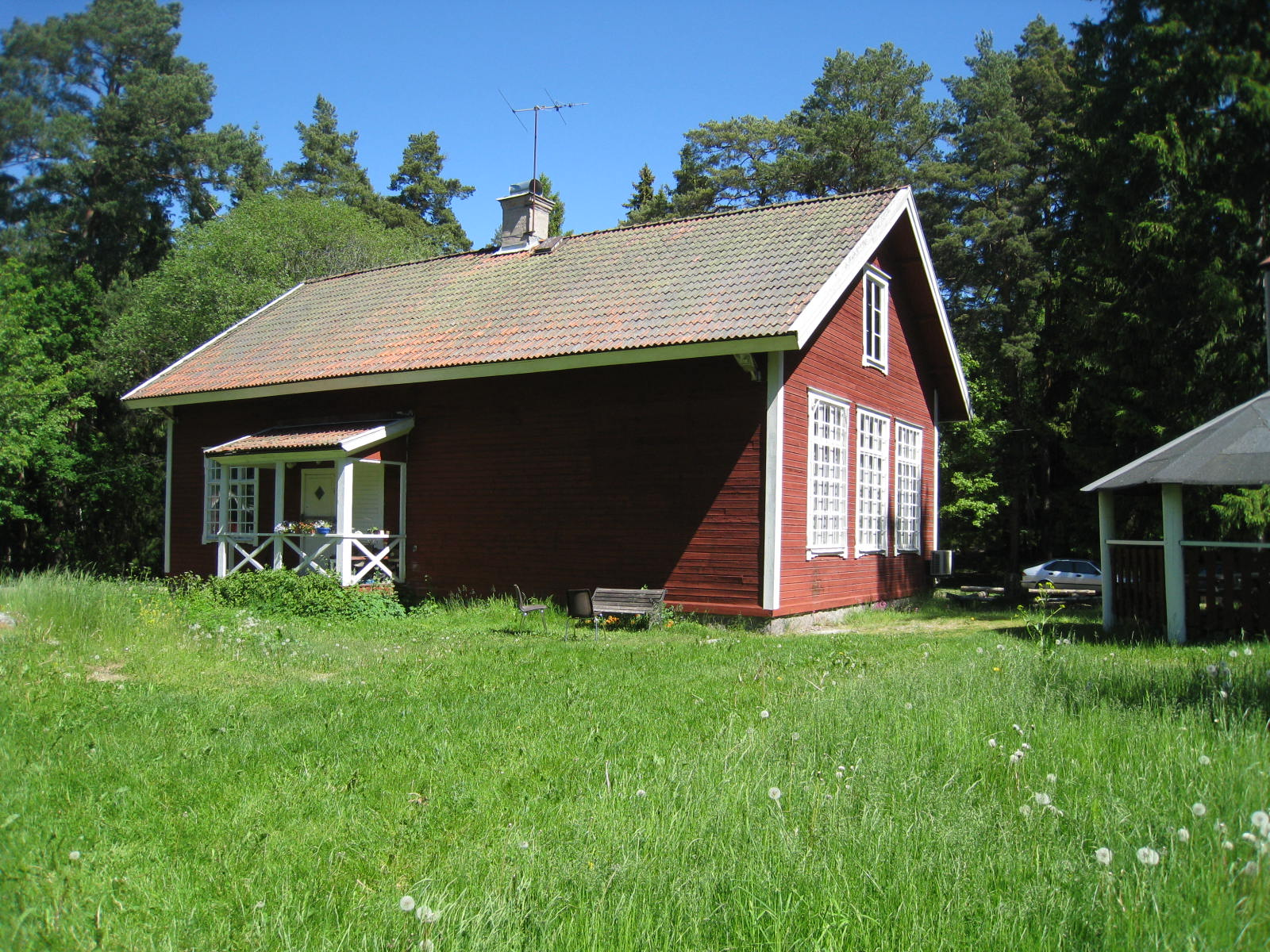 Görvälns skola i Järfälla, Stockholms län, byggdes 1896 och var i bruk som skola till 1939. Sedan 1994 ägs Görvälns gamla skola av föreningen Motorcykelentusiasterna.